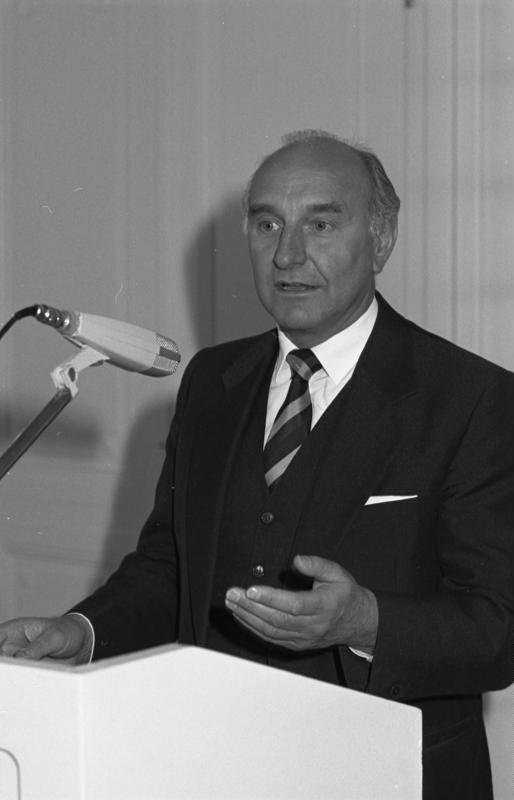 Übergabe des Ludwig-Erhard-Preises für Wirtschaftspublizistik an Dr. Ernst Günter Vetter in der Redoute.